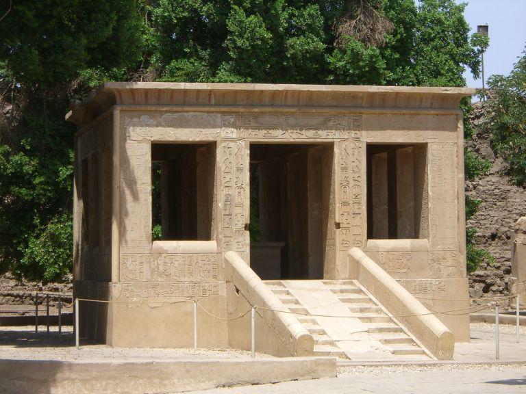 Kiosque de Sésostris Ier - XIIe dynasstie égyptienne - Musée en plein air de Karnak (Open air kiosk of Senusret I at Karnak)